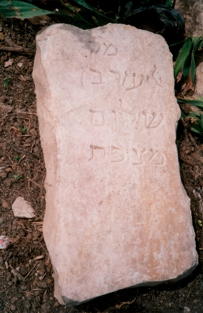 מצבה שצולמה במהלך יום איתור, תיעוד וניקוי בבית הקברות סמבוסקי בירושלים, נובמבר 2006.